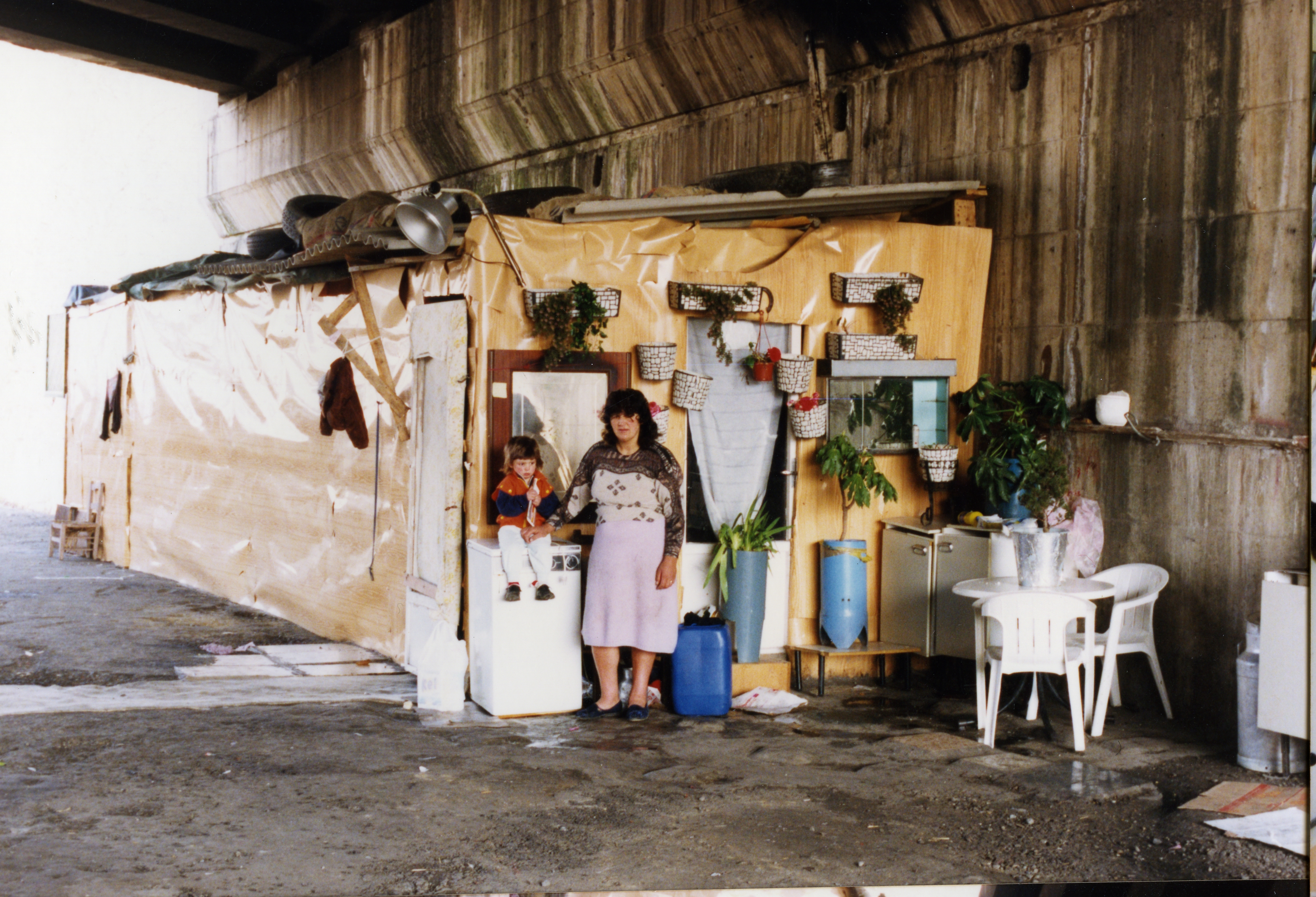 Ana eta Jose txikia, Txistoki zubipeko etxeko atarian. Aiurri 0 zbk. 20. orr.